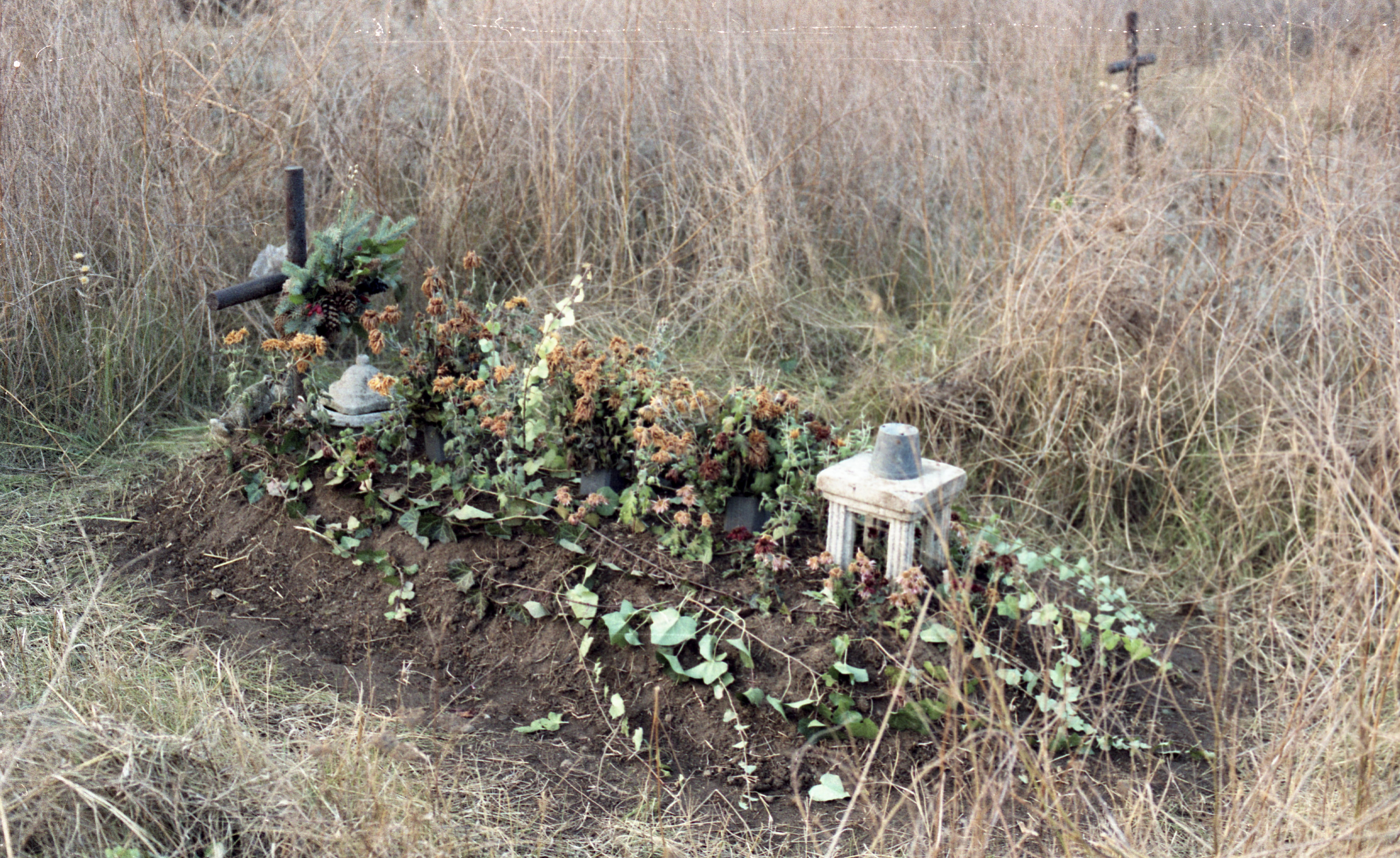 Új Köztemető, 301-es parcella. Location: Hungary, Budapest X. Tags: colorful, grave, Budapest, cemetery Title: Új Köztemető, 301-es parcella.